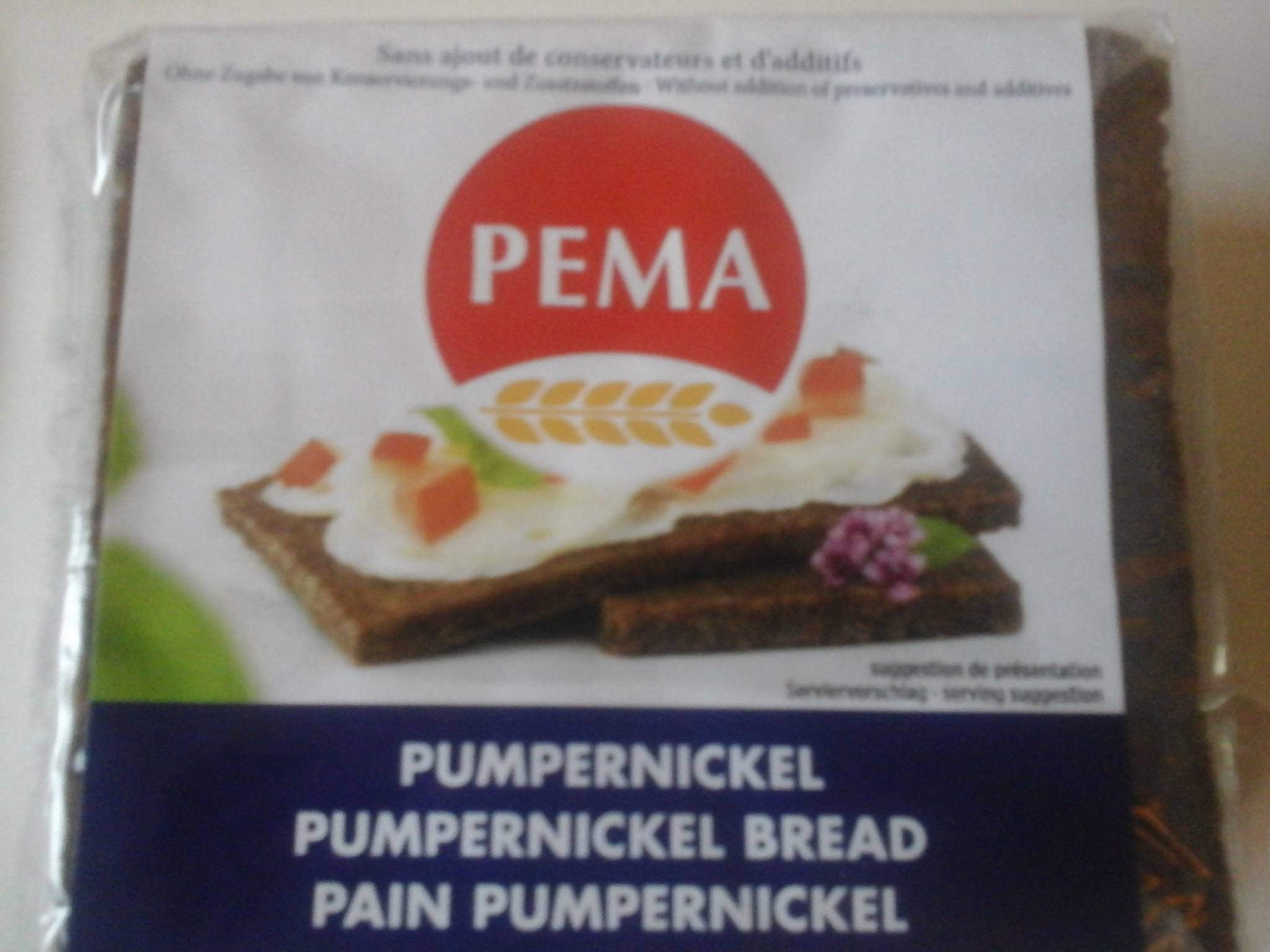 Pumpernickel.